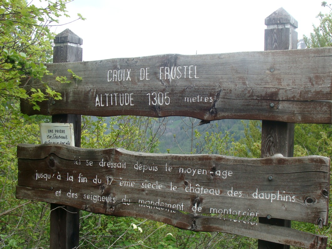 Inscription au sommet de la colline de Frustelle (commune de Saint-Jean-Saint-Nicolas, Hautes-Alpes) rappelant la présence en ce lieu de l'ancien château de Montorcier.